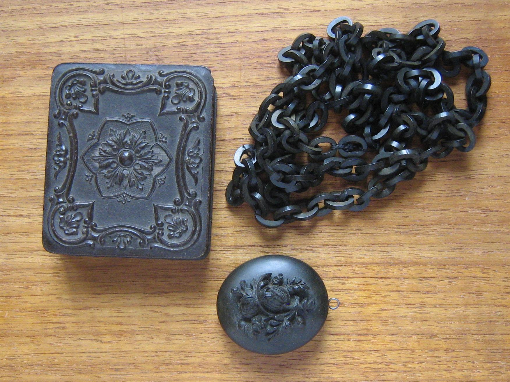 Ebonit. Damklockkedja 1860-tal, medaljong ca 1870 och etui för tinotyp 1857